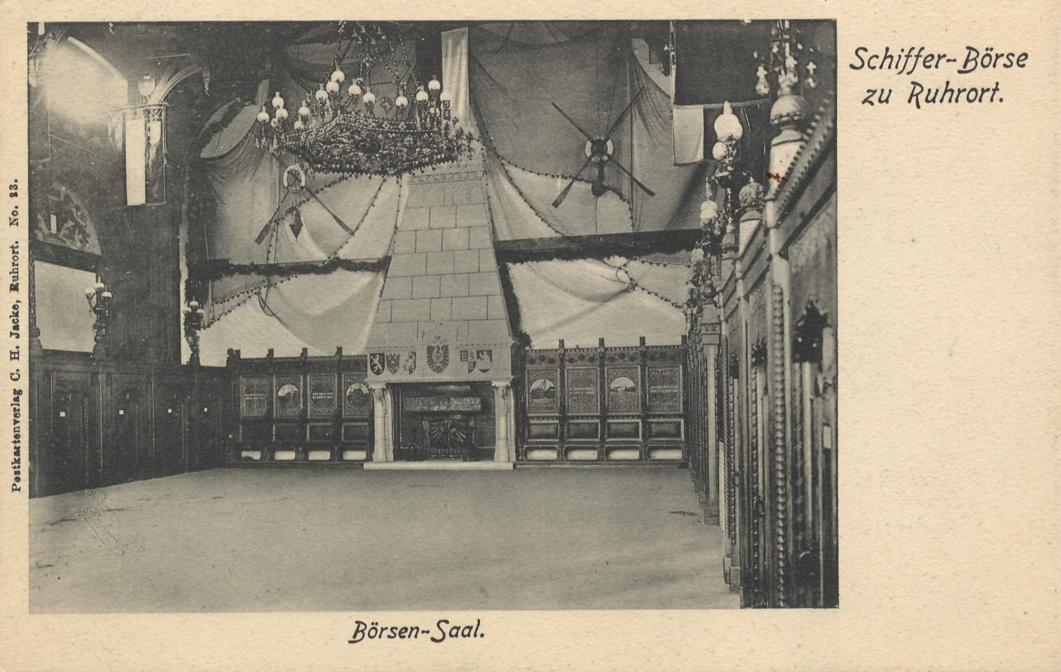 Postkarte mit Ansicht des Börsensaalsin der Schifferbörse in Duisburg